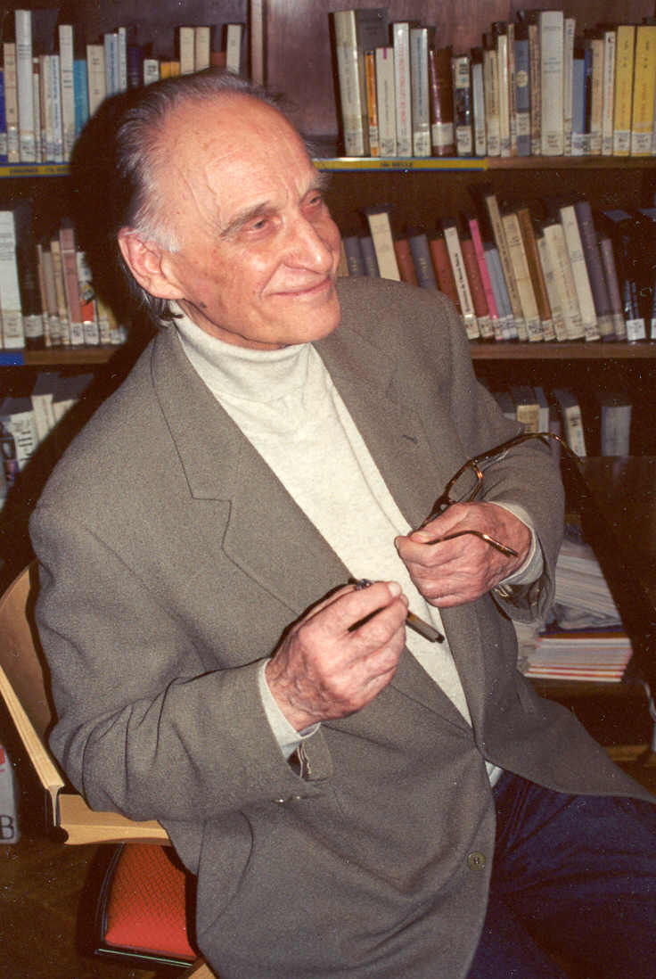 Ivo Malec à l'occasion de la remise de l'Ordre national du Mérite par l'Ambassadeur de France Albert Turot.